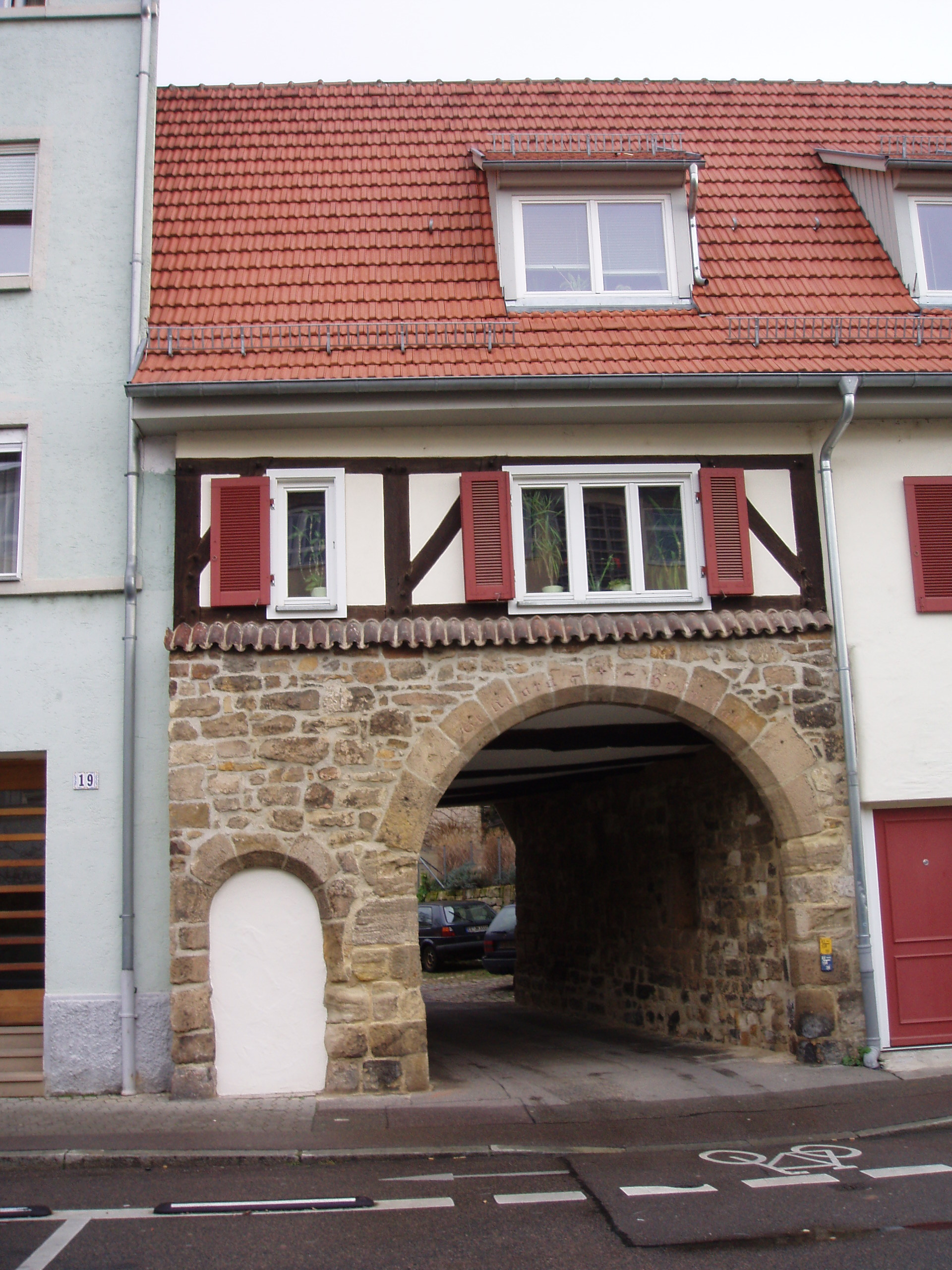 Durchgang zum ehemaligen Kloster in der Obertorstraße 21/23